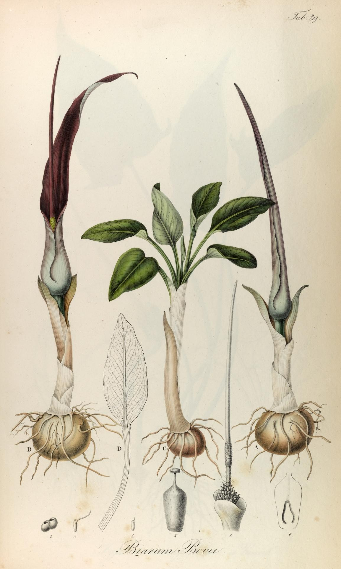 x/.,^ /jy^t M* y/ jsa /'//;;/ ' yJr/ vy